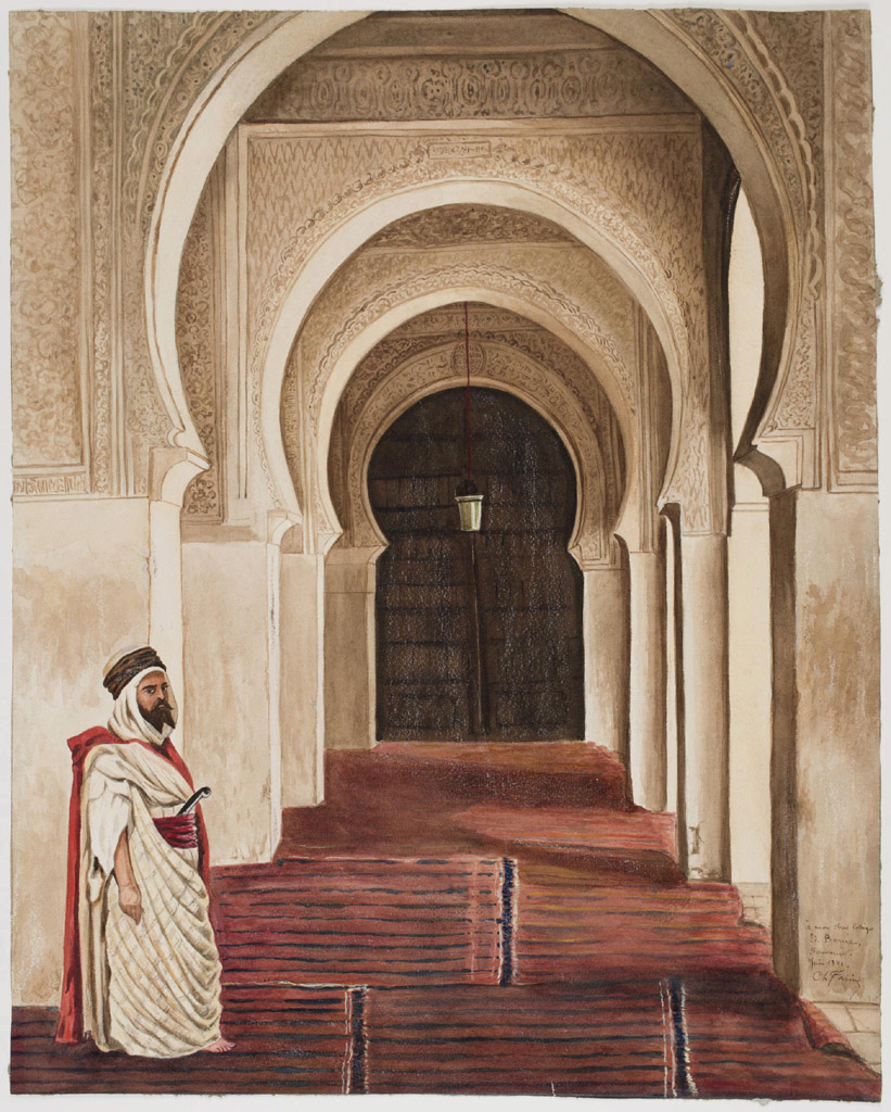 Si-Bou-Médine - Mosquée de Tlemcen par Charles FARINE (1818-1883), 1881. Aquarelle et gouache sur dessin au crayon. Hauteur de la feuille en mm 520 ; Largeur de la feuille en mm 420. Dédicacé, daté et signé en bas à droite, à mon cher collègue Ed. Bonie, Souvenir. Juin 1881. Ch Farine. Numéro d'inventaire : Bx M 1531. Historique : Ancienne collection Bonie, n° 1793 de l'inventaire manuscrit de la collection. Mode d'acquisition Legs Bonie, 1895. (Musée des Beaux-Arts - Mairie de Bordeaux. Cliché DEVAL, Frédéric).